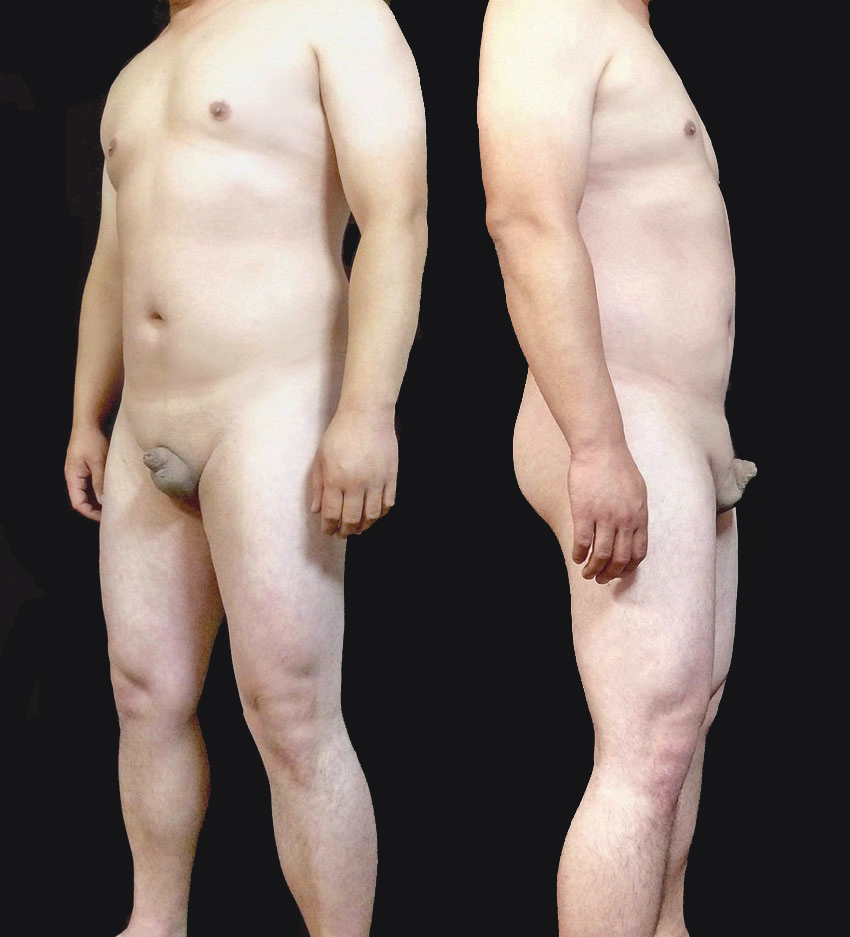 小陰茎症男性の全身画像